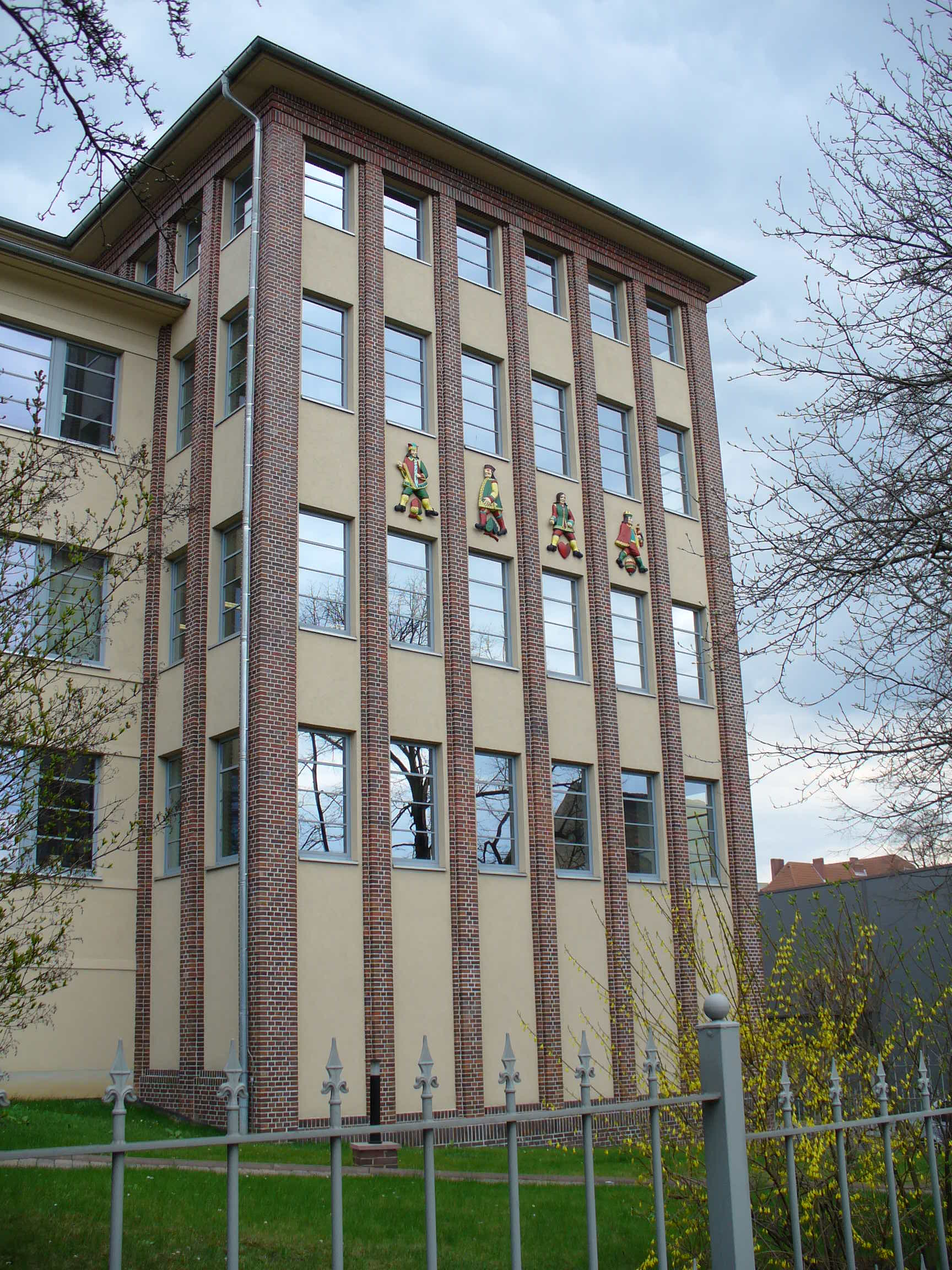 Hauptgebäude der Spielkartenfabrik in Altenburg